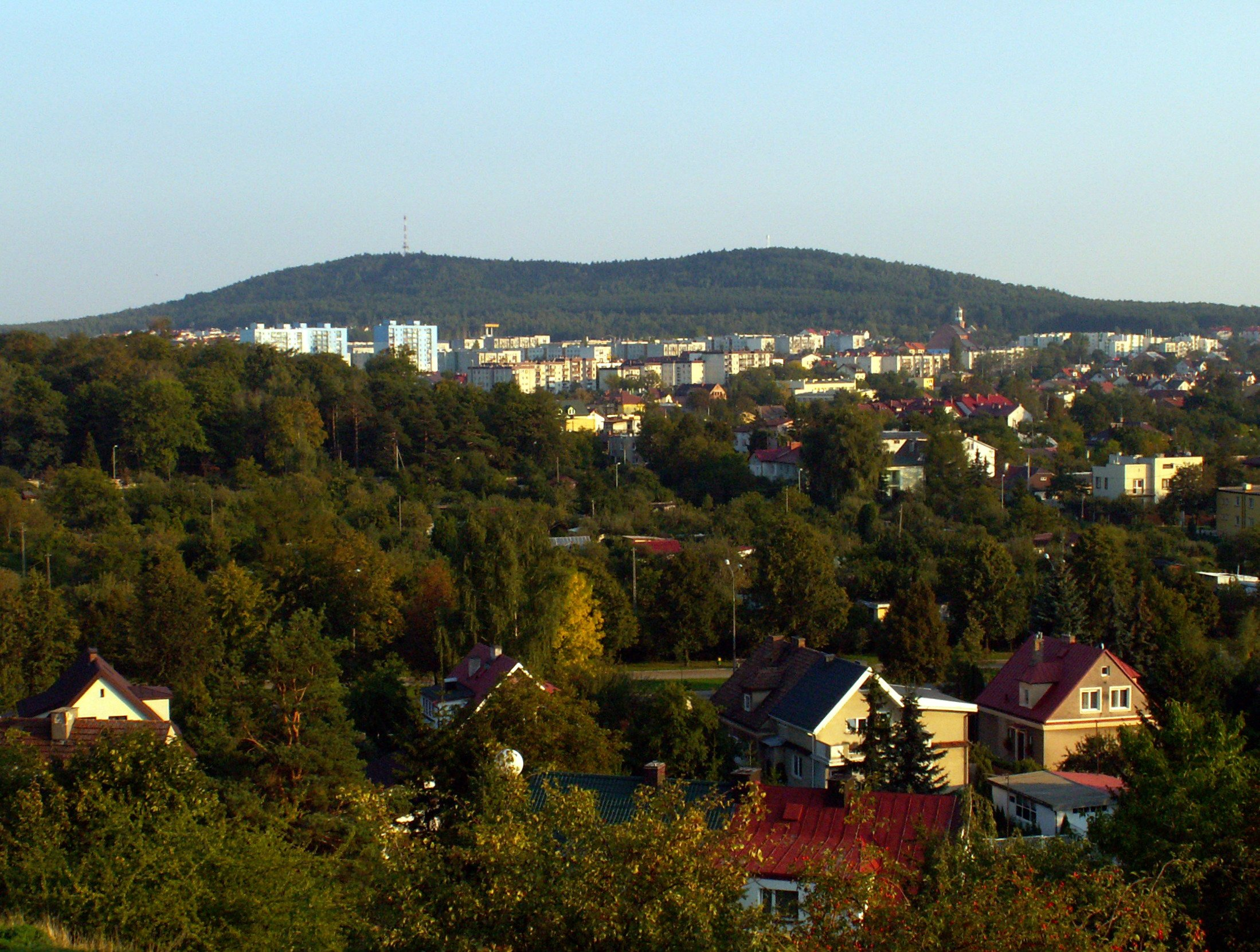 Barwinek quarter in Kielce (Poland)